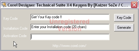 Keygenin kuvakaappaus.